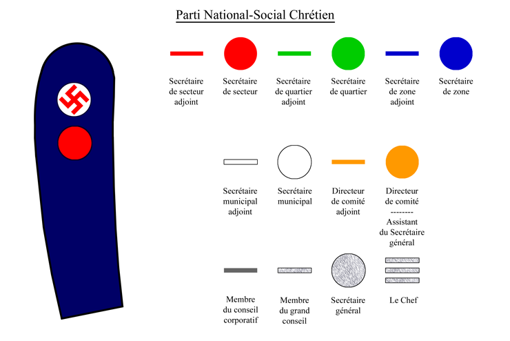 Insignes de grades du Parti National Social Chrétien basé sur leur descriptions donné dans le pamplet "Programe et règlements: Le Parti National Social Chrétien du Canada" (1935).